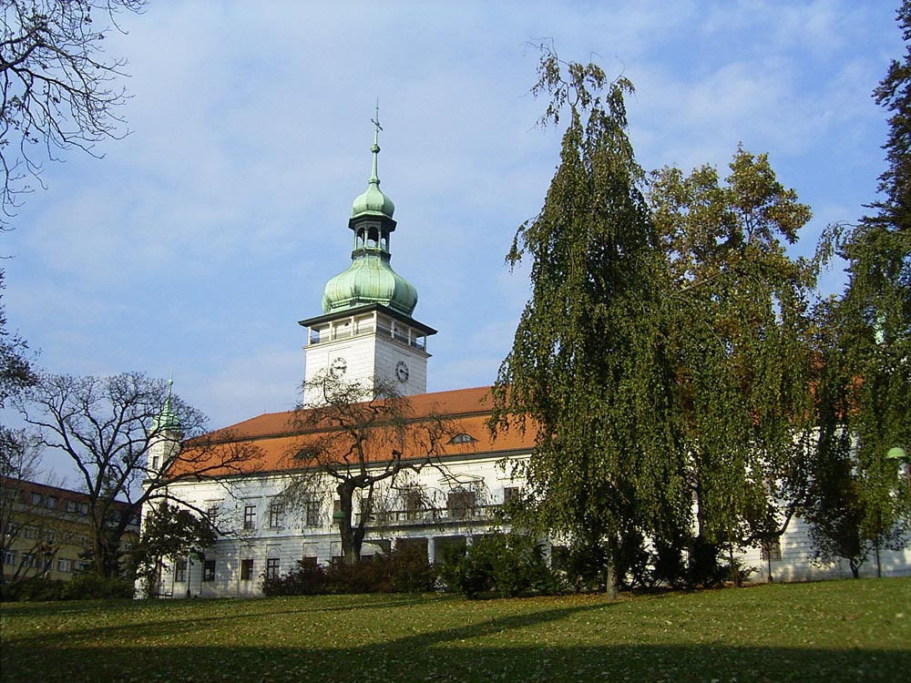 Vsetínský zámek